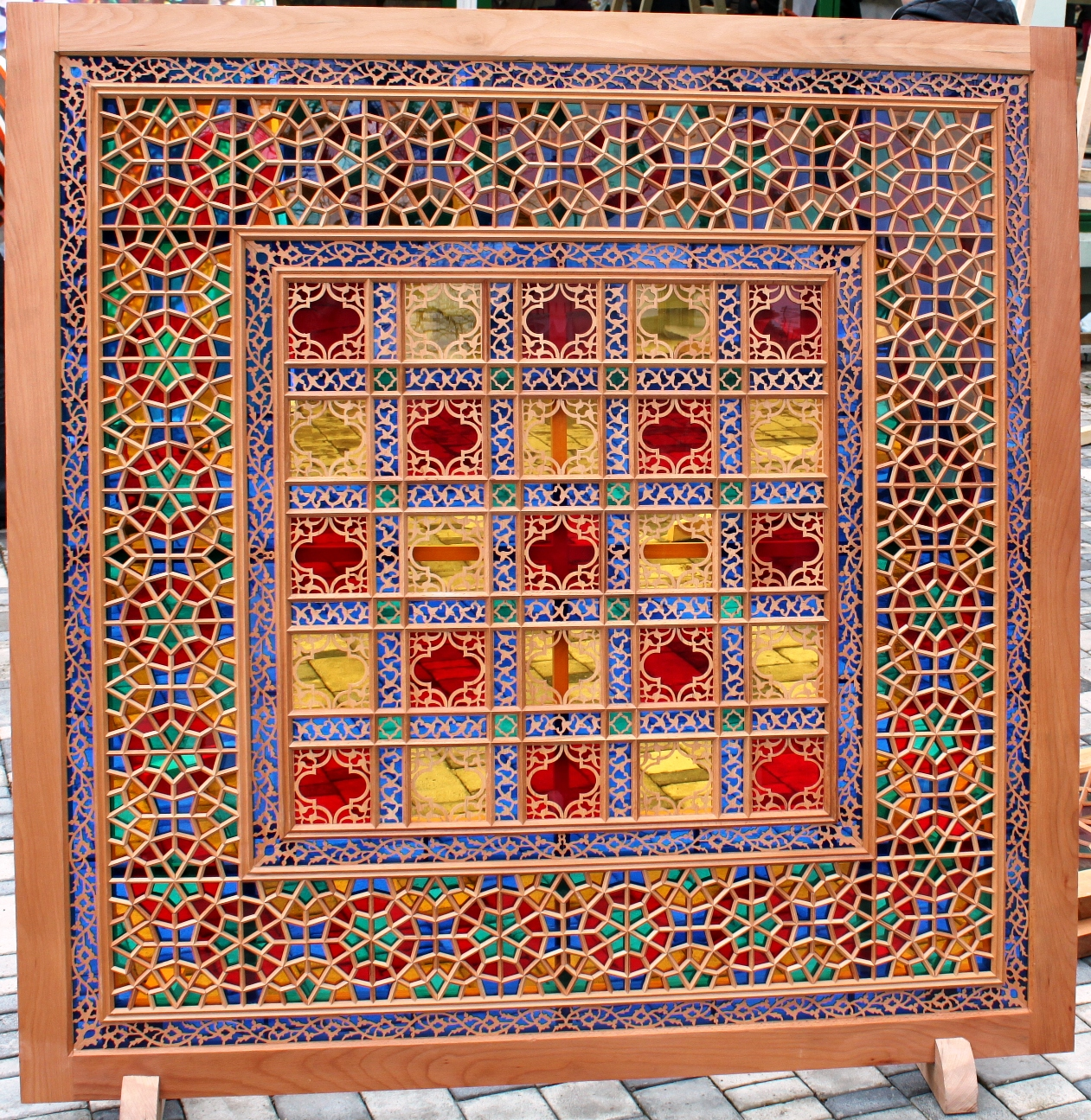 Шэбеке (дерево+стекло) ни одного гвоздя.